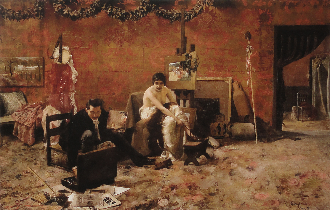 Atelier de Pedro Weingärtner em Roma, óleo sobre tela, 35 x 54 cm, coleção particular